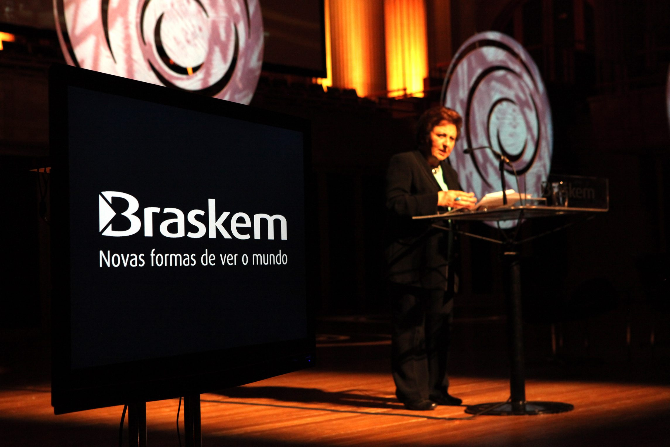 Shirin Ebadi no palco do Fronteiras do Pensamento São Paulo 2011 (Sala São Paulo) شيرين عِبادي خلال مشاركتها بمؤتمر آفاق الفكر بساو باولو-البرازيل 2011